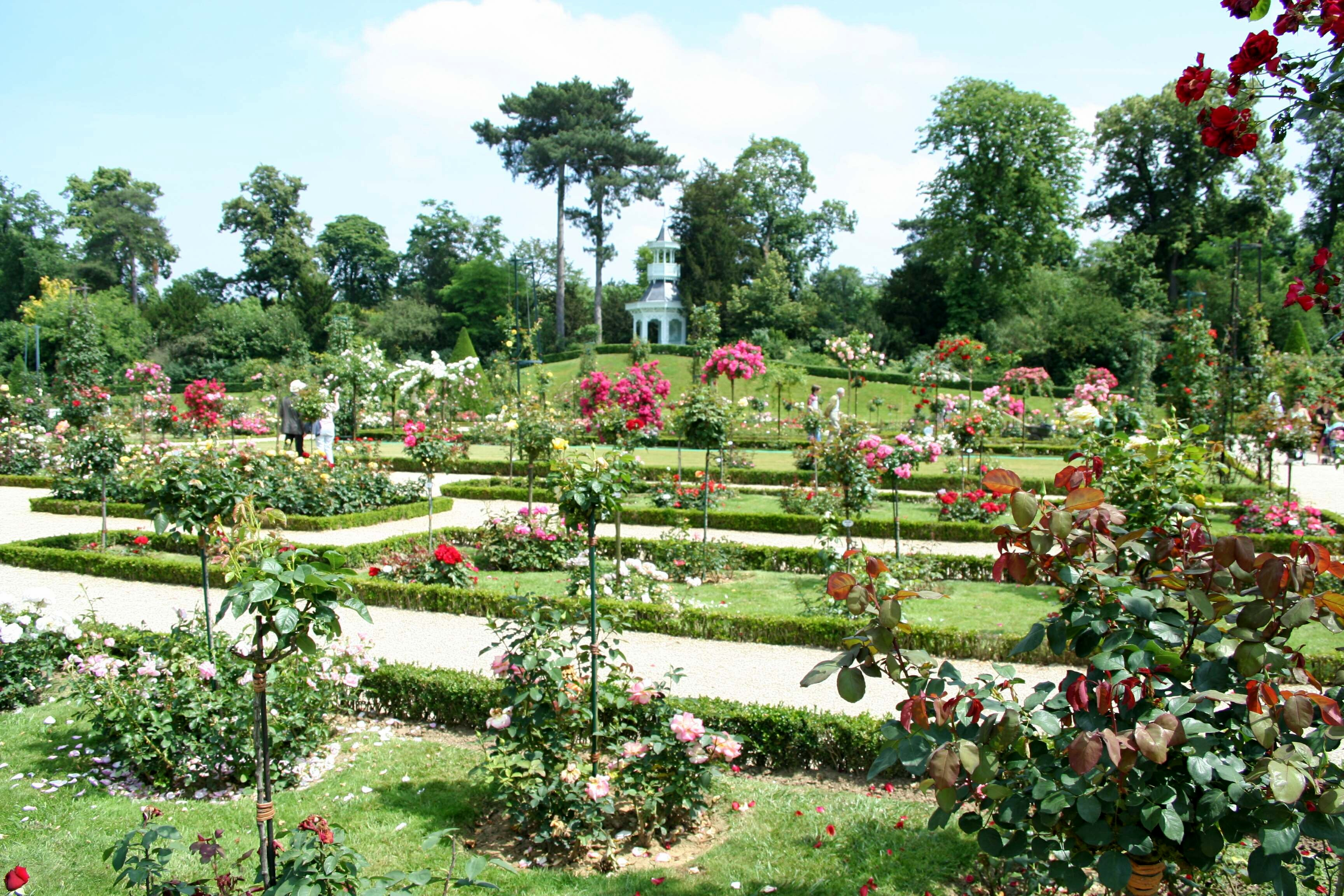 Roseraie classique de Bagatelle Paris (France)